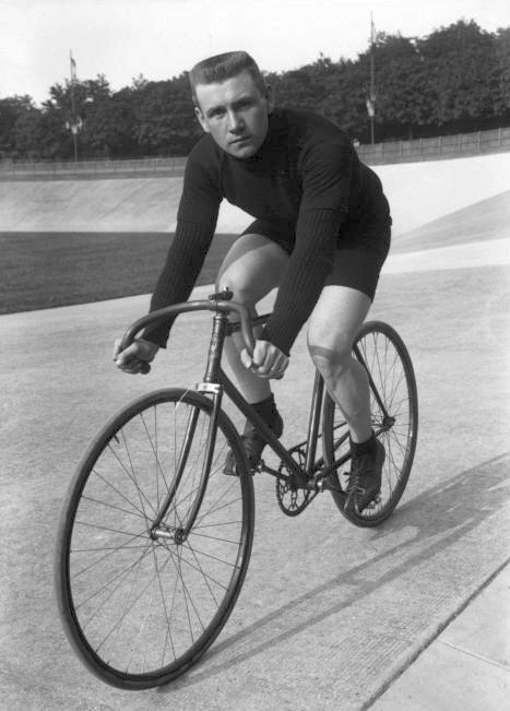 Pouchois, portrait du cycliste sur son vélo